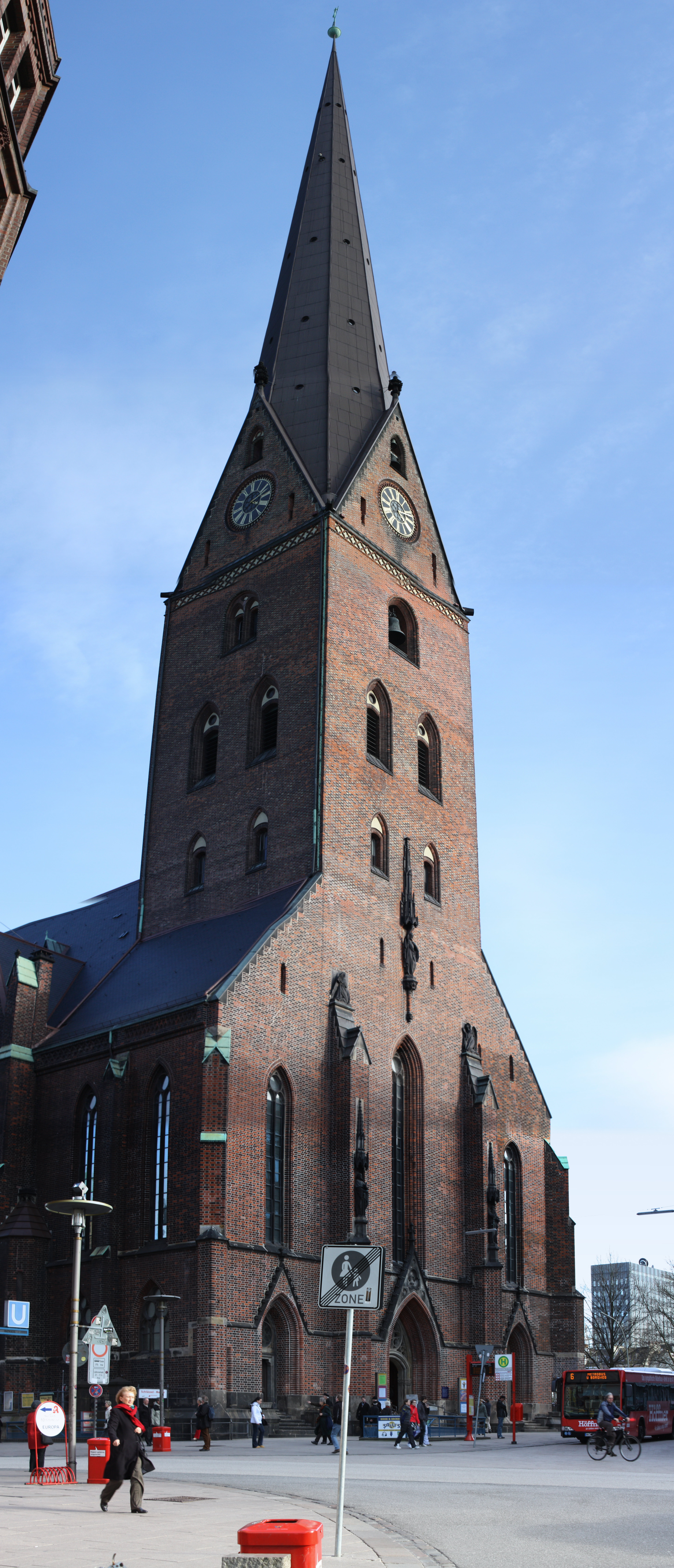 St. Petri, Hamburg This is the photograph of an architectural monument. It is part of the list of cultural monuments of Hamburg, no. 52